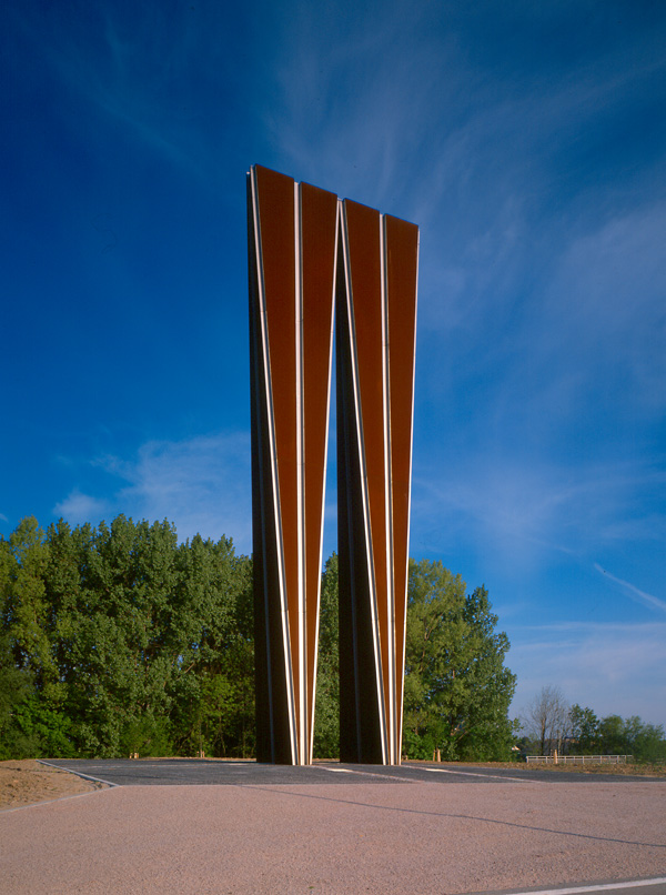 David D. Lauer: DENKMALSKULPTUR FÜR RANGIERBAHNHOF, 1988, Corten-Stahl und V2A-Stahl, 12 x 4 x 2 m